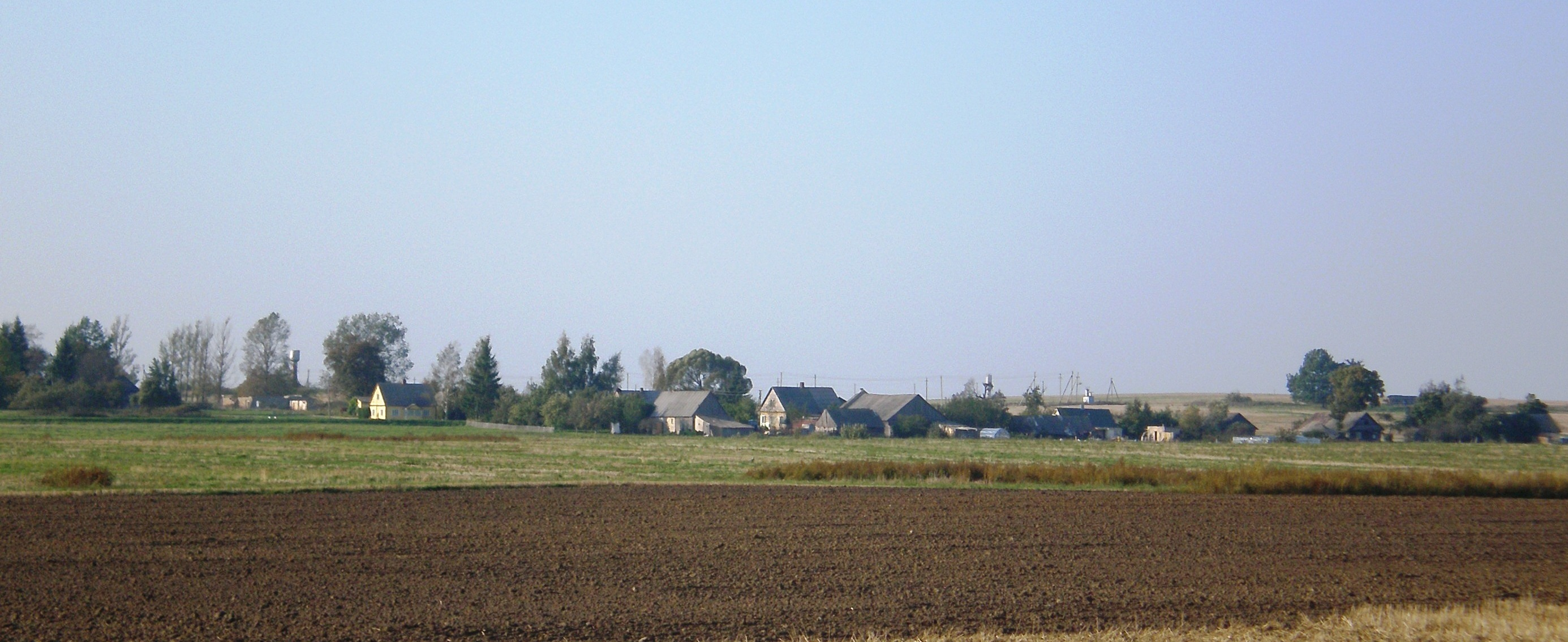 Šmotiškiai, Kėdainių raj.